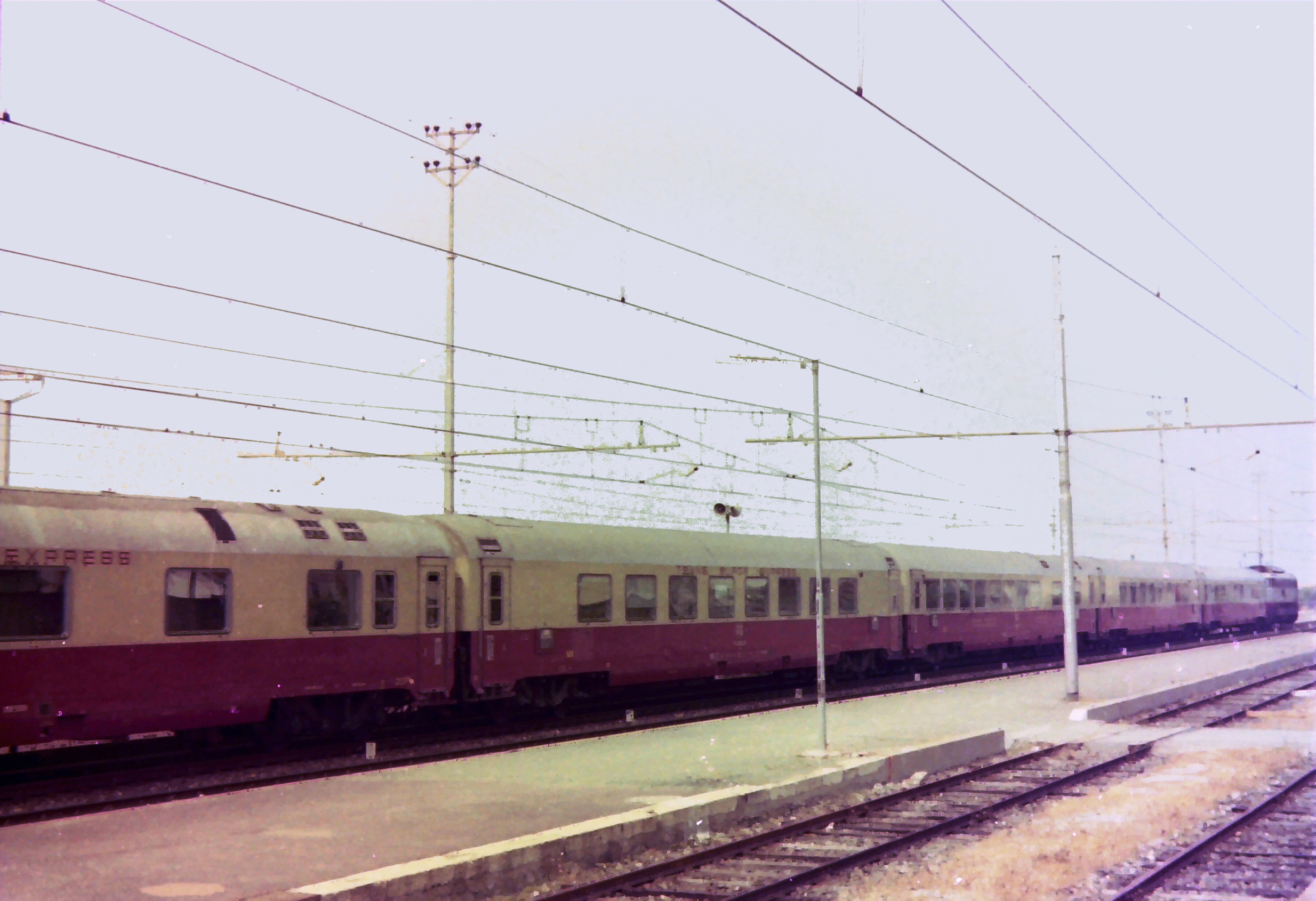 Il treno TEE "Ligure" Milano-Avignon transita a Bordighera nell'estate 1976